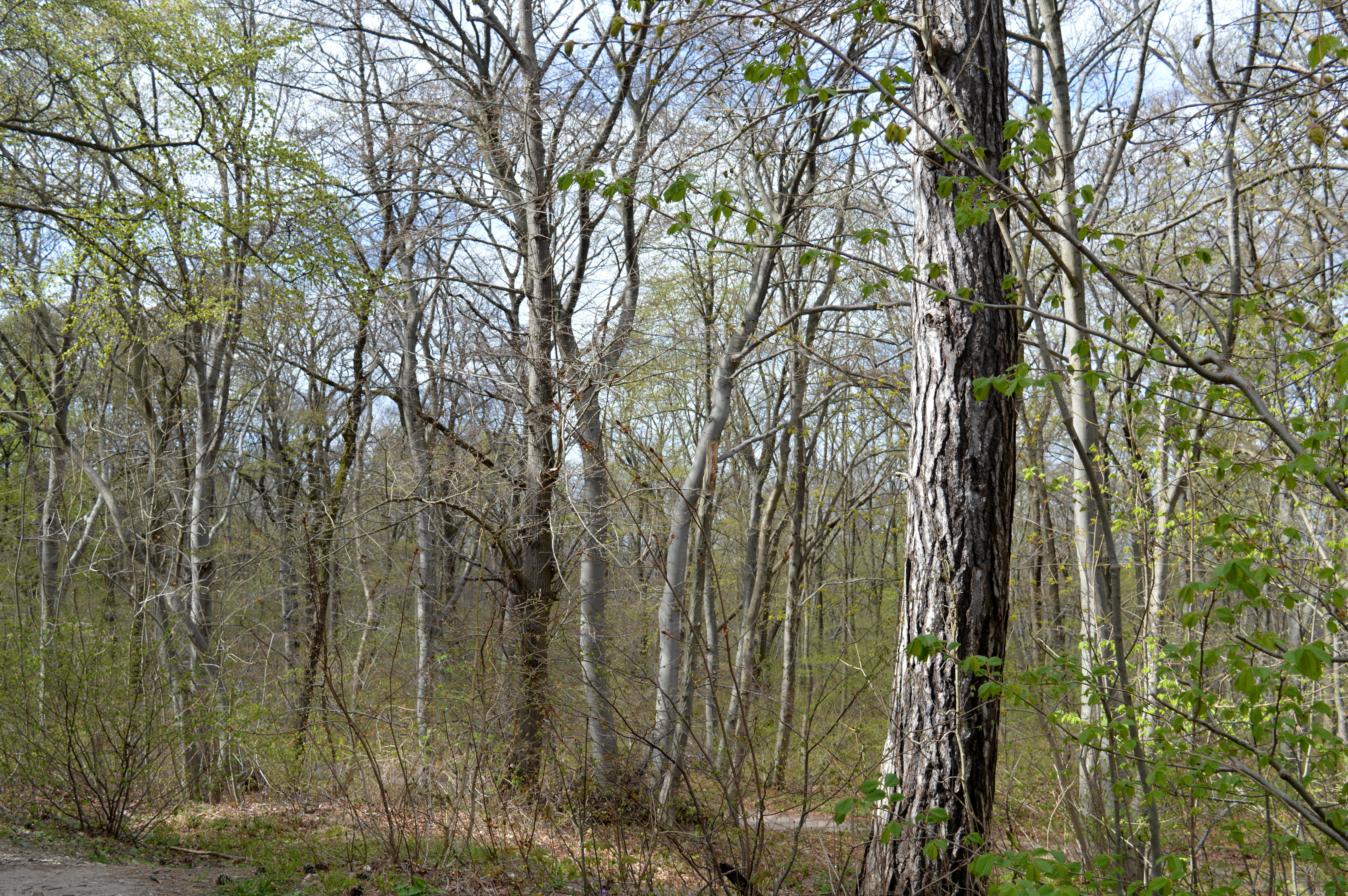 Naturschutzgebiet Herrenberg und Vorberg im Huy - Am Weinberg